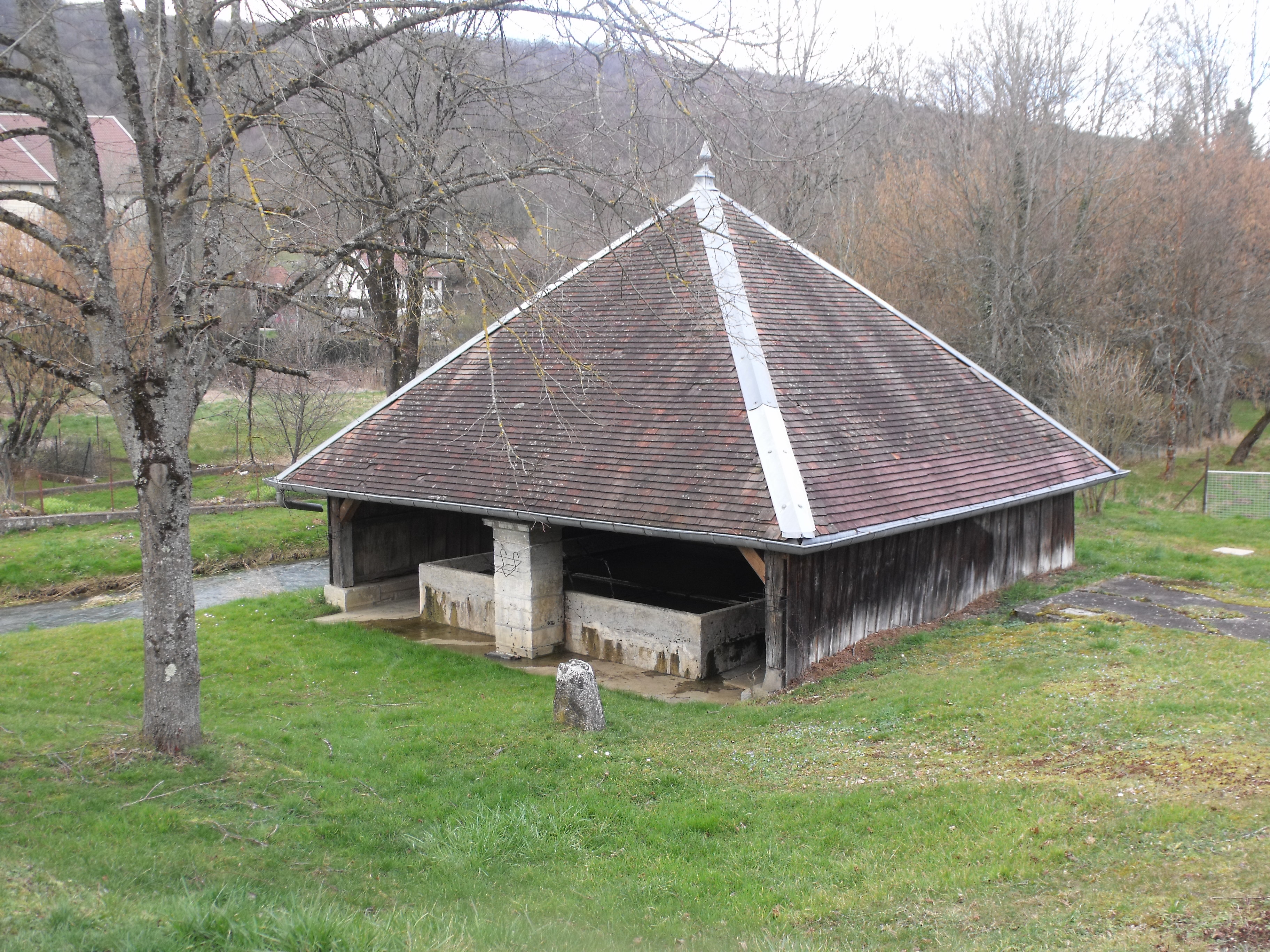 Fontaine lavoir d'Hyèvre Paroisse, Doubs, France